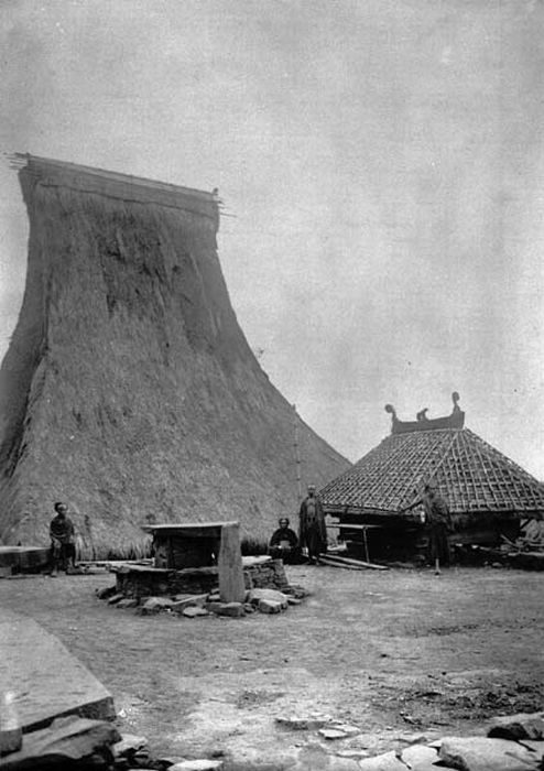 Foto. Dorpsplein in Roga Ria met een geestenhuis, een graf van lokale bestuurders en een offeraltaar